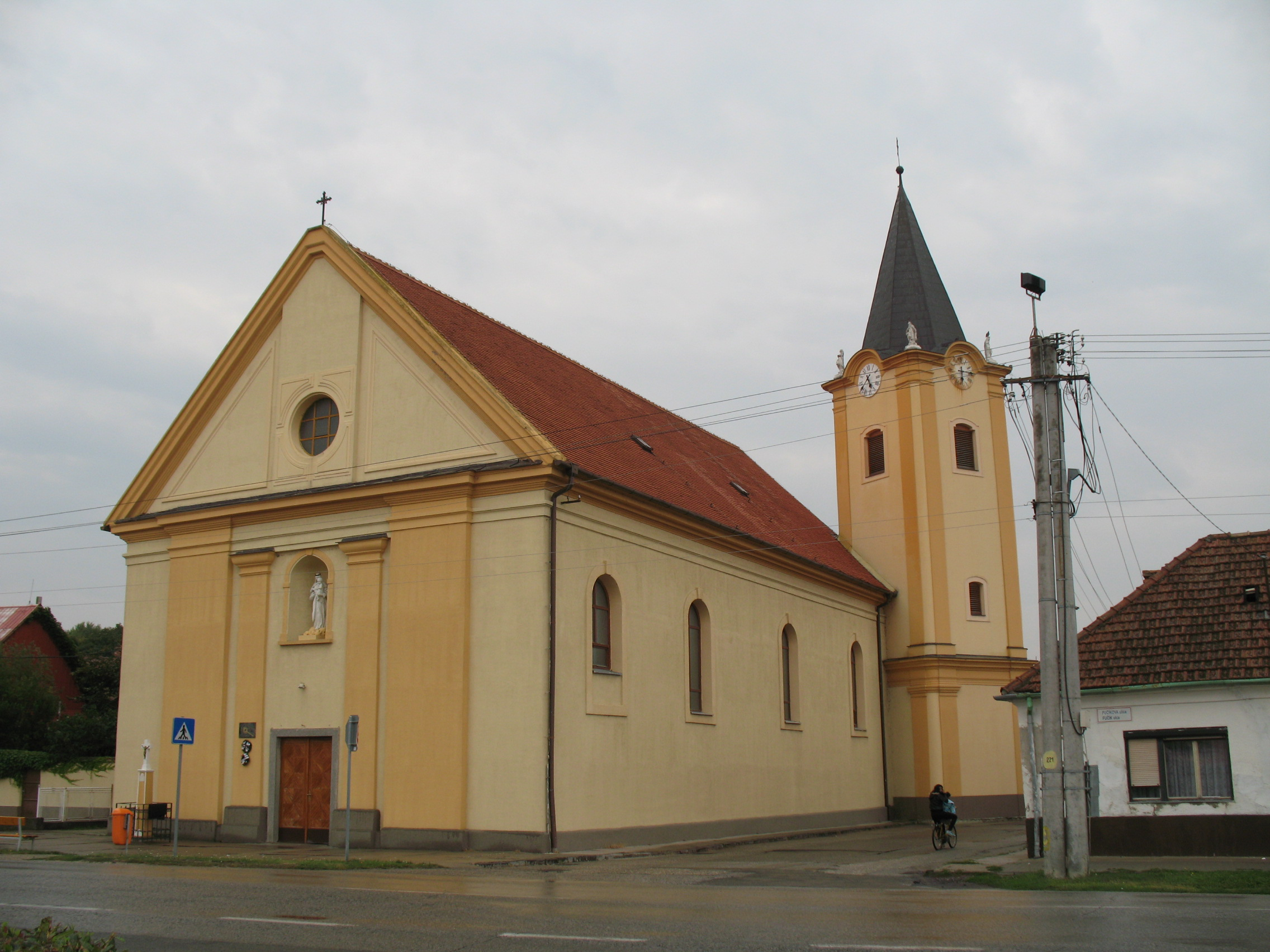 Diószeg